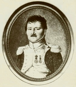 Nicolas Rozat de Mandres, colonel du 22e régiment de dragons. Il se distingue le 11 août 1812 à la bataille de Majadahonda, où il commande une brigade de la division de dragons du général Trelliard.